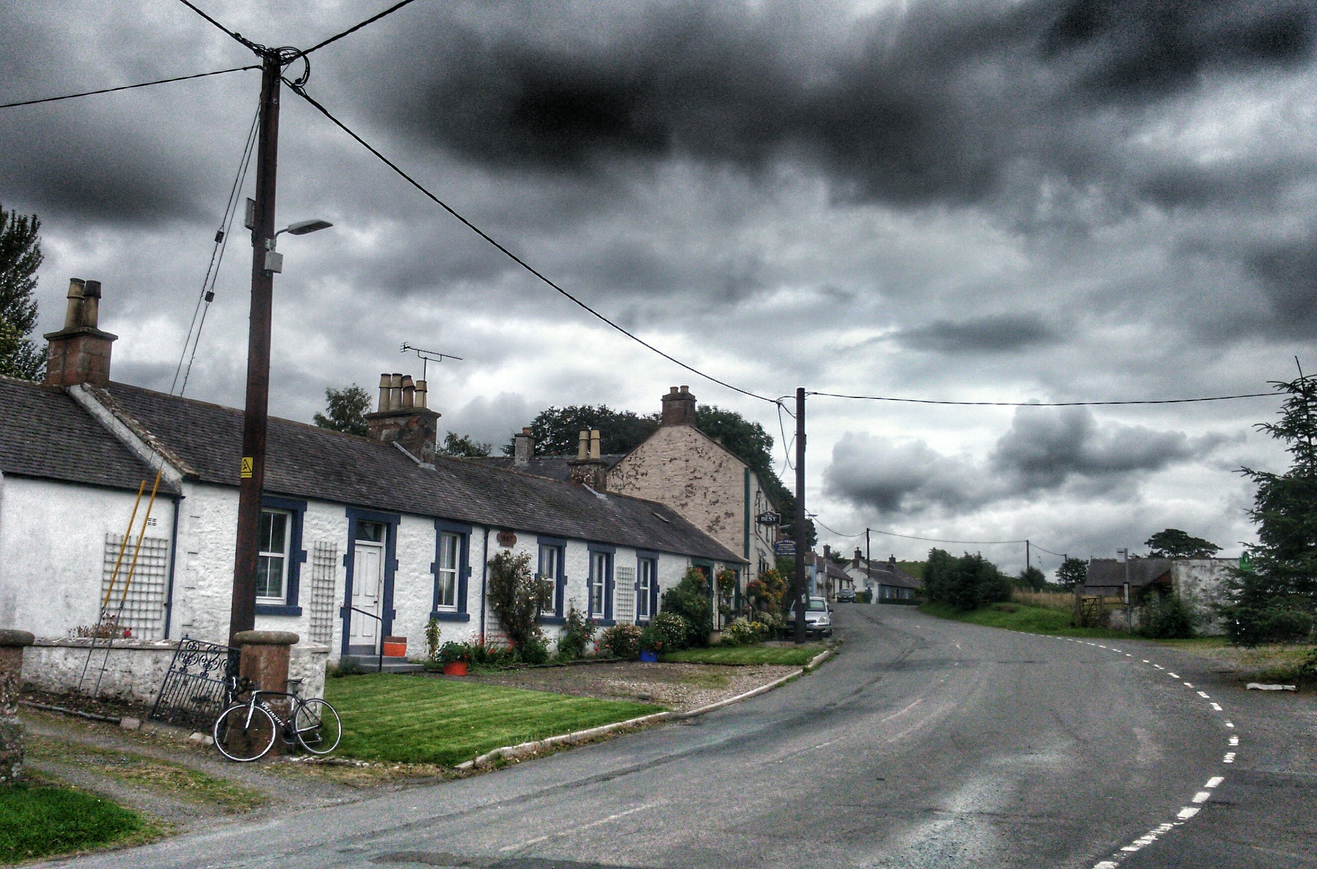 Gàidhlig: Sealladh air Daltan